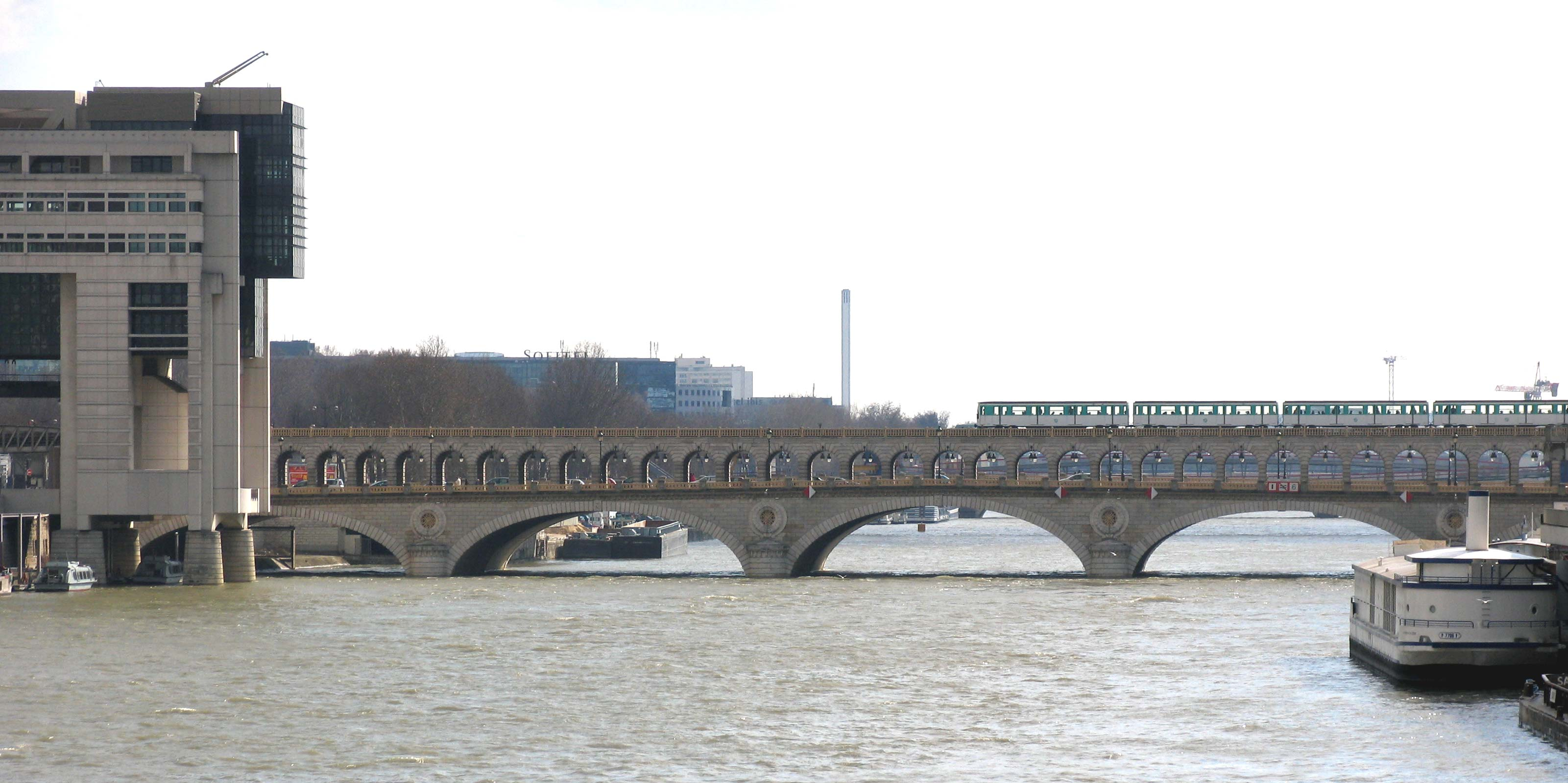 Pont de Bercy à Paris Une rame de métro de la ligne 6 passe sur la partie supérieur du pont. A gauche une partie du batiment du ministère des Finances. Photographié depuis l'aval. Paris France.